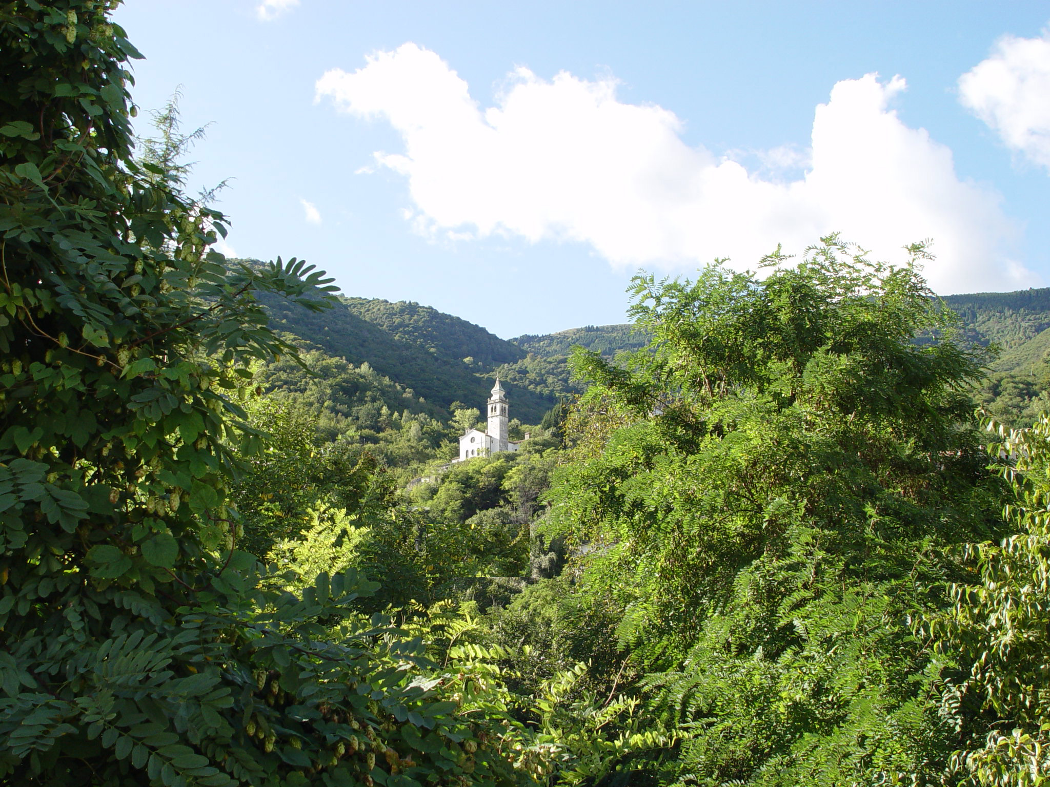 Revine, frazione di Revine Lago: la chiesa di San Francesco di Paola.